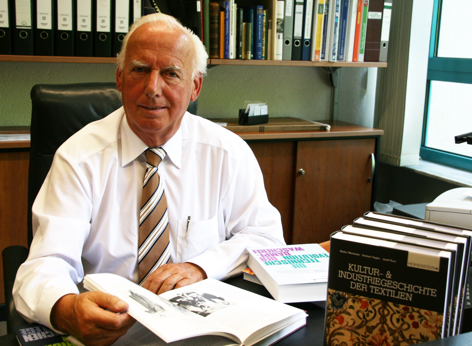 Prof. Dr. h.c. Josef Kurz